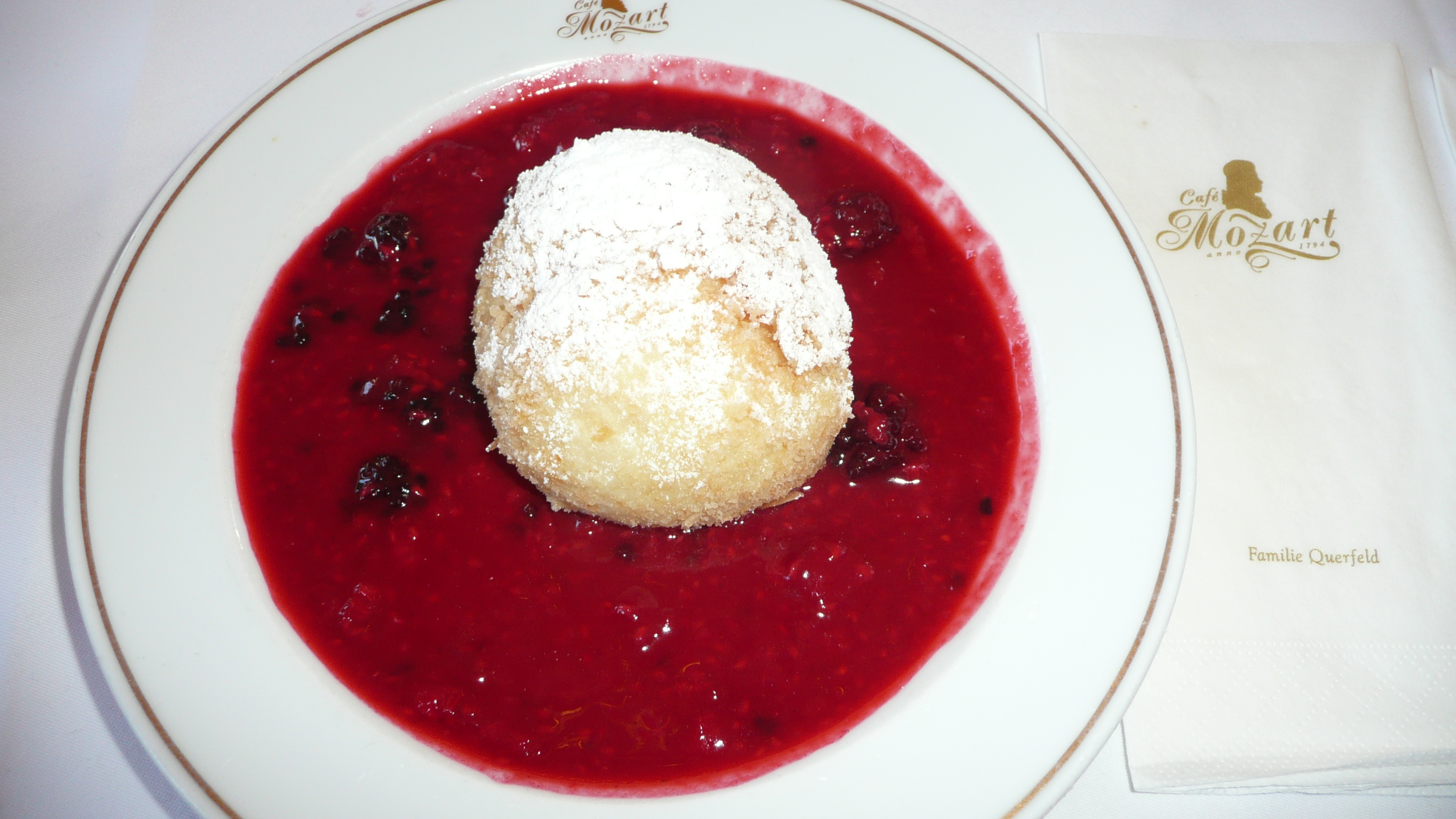 Topfenknödel im Cafe Mozart in Wien